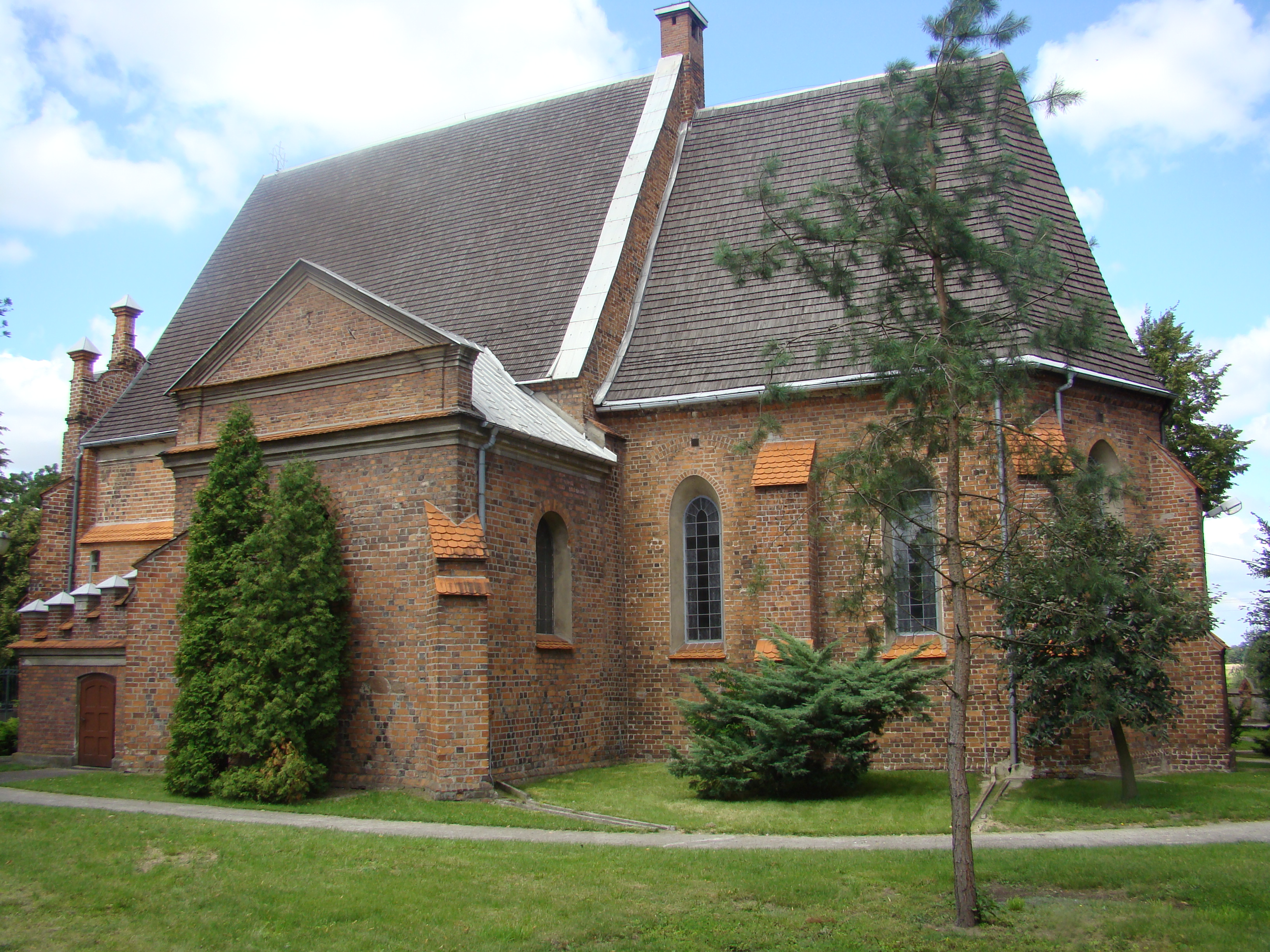 STAW KOŚCIÓŁ 01